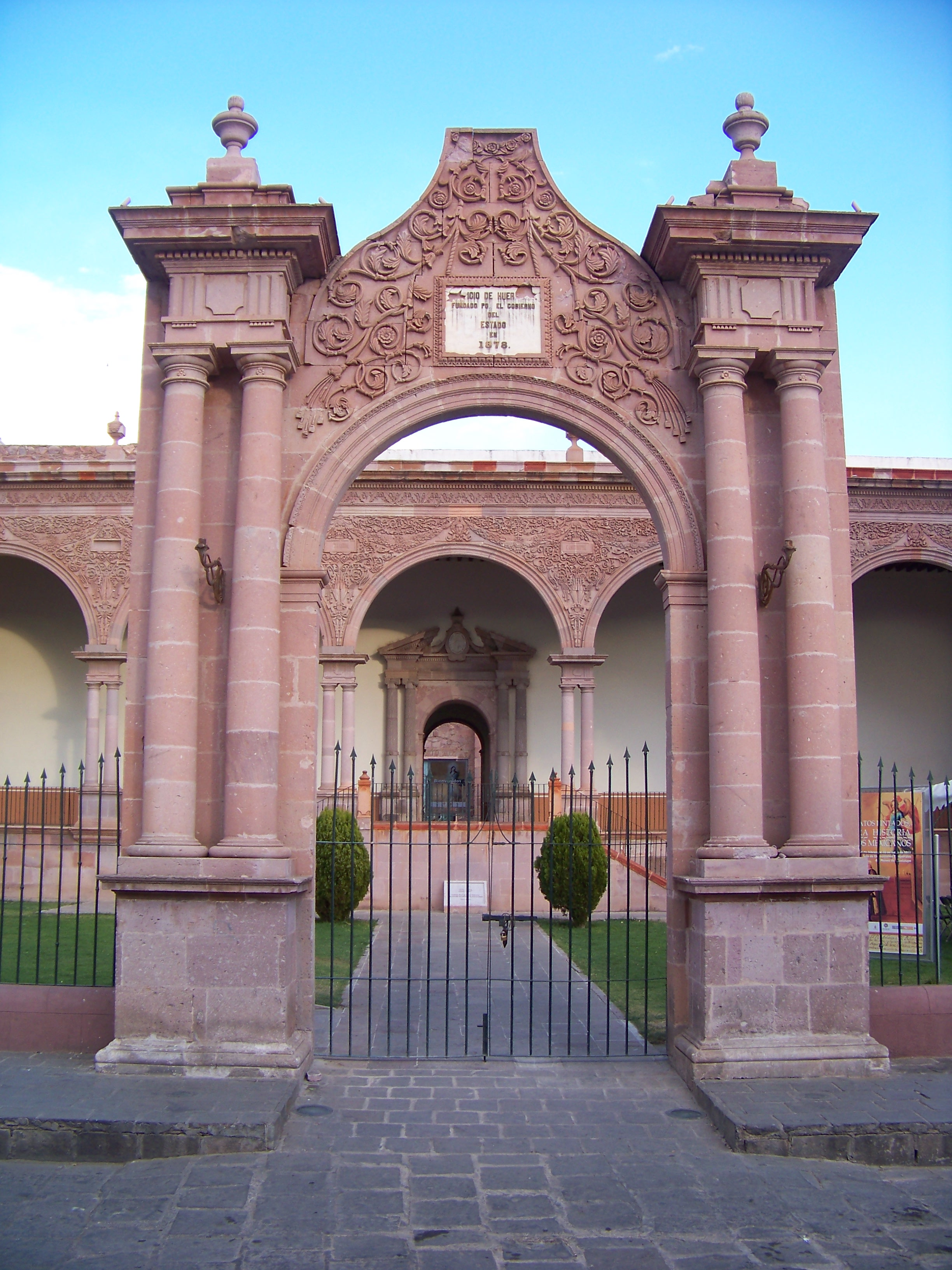 Portico del Museo de Guadalupe, Zacatecas, (Ex Hospicio de Niños).